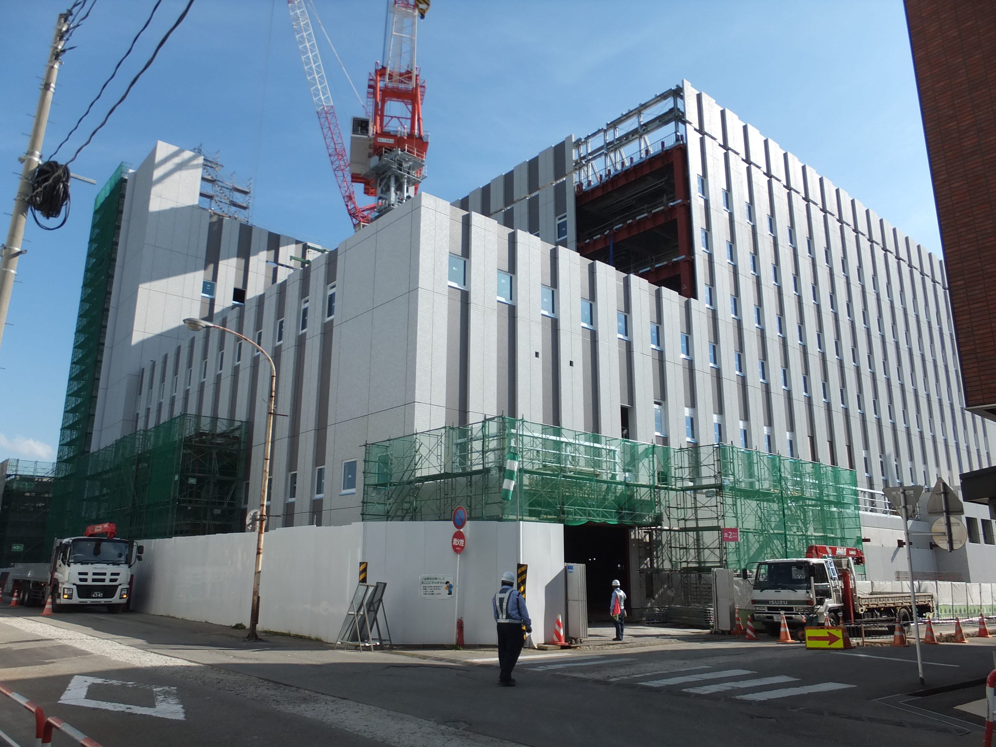 建設中の仙北組合総合病院新病棟（大曲厚生医療センター）。現病院にほど近い旧ジョイフルシティ跡地に建設が進められている。羽後信用金庫大曲支店付近より撮影。